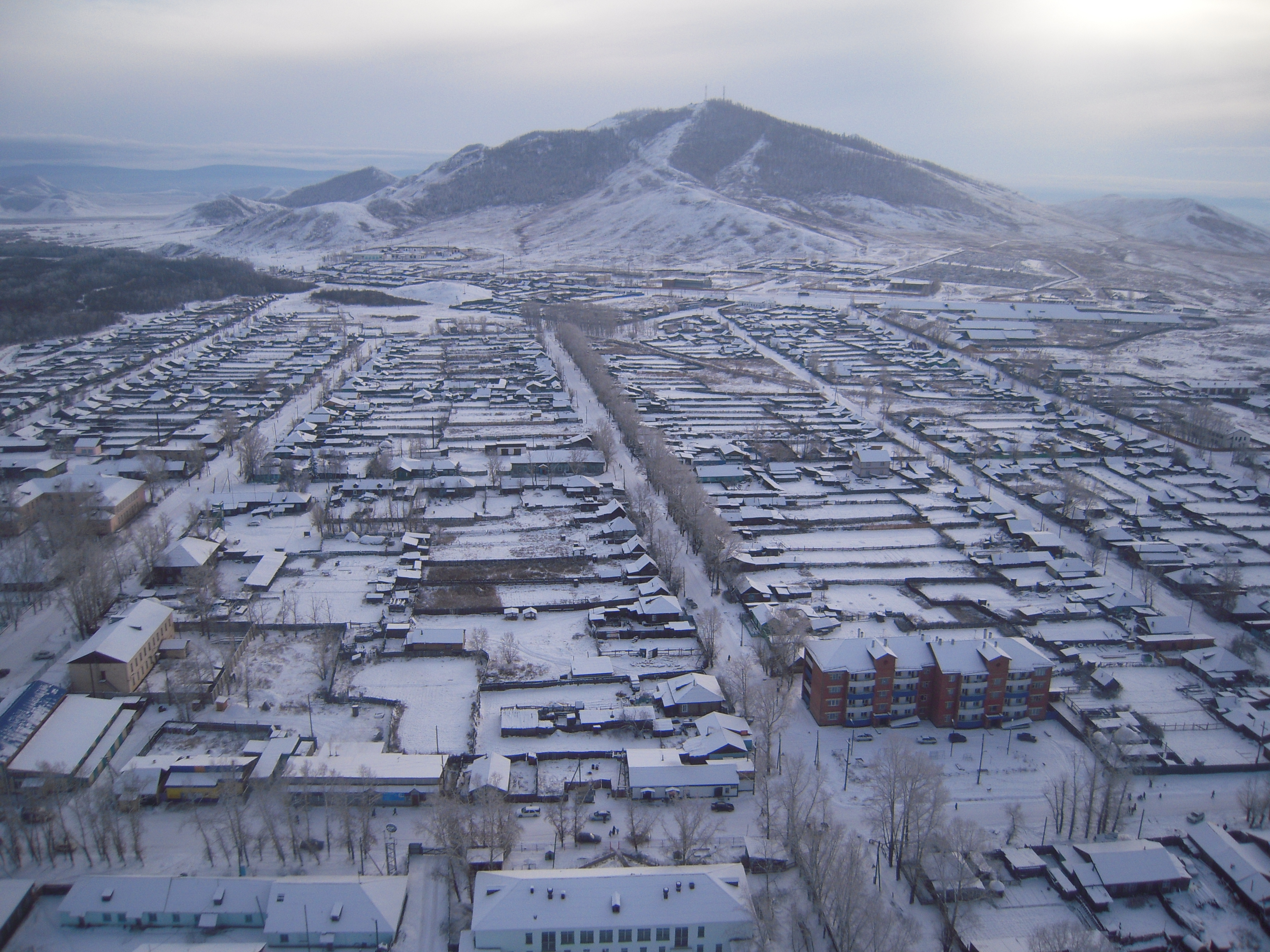 Фотография сделана с мотопараплана. Общий вид. Центральная часть города. Автор:Митрохин Владимир.